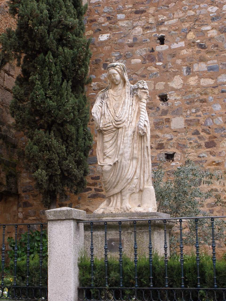 Estatua de Ceres en el Foro de los Balbos (Cáceres)